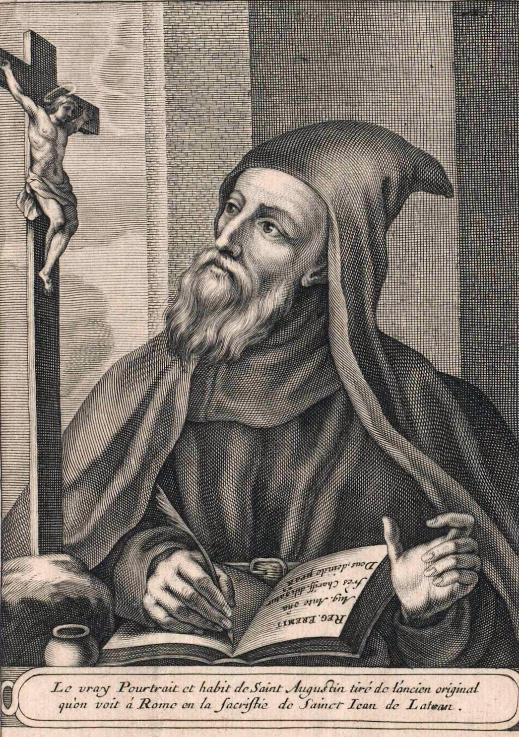 Augustinus von Hippo, Heiliger (354 - 430)